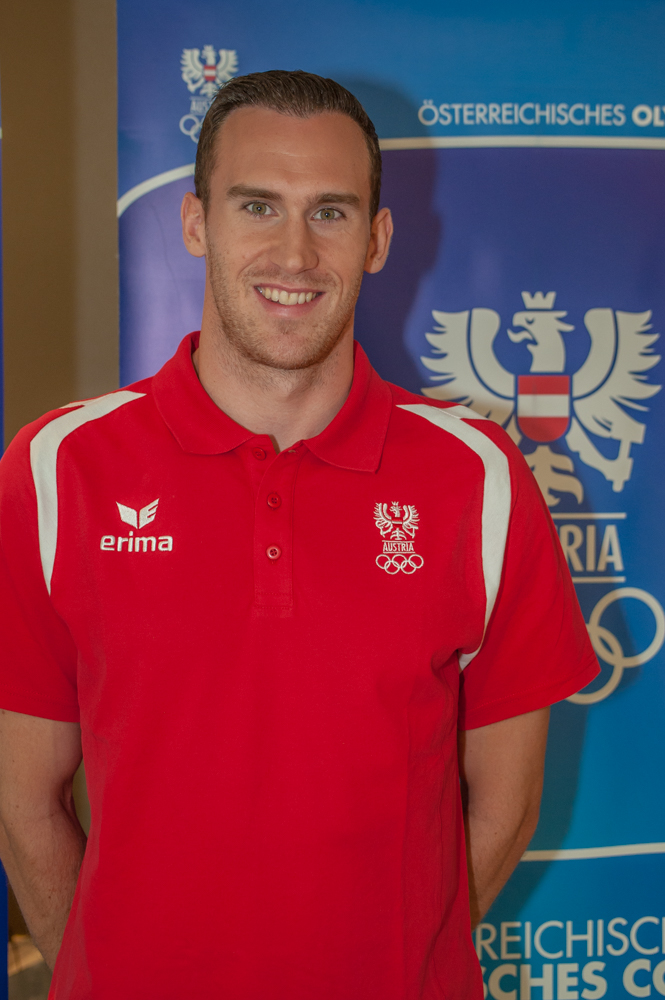 Einkleidung der Österreichischen Teilnehmer an den Olympischen Sommerspielen 2016 am 16./17. Juli 2016 in Wien. Bild zeigt Dominik Distelberger.